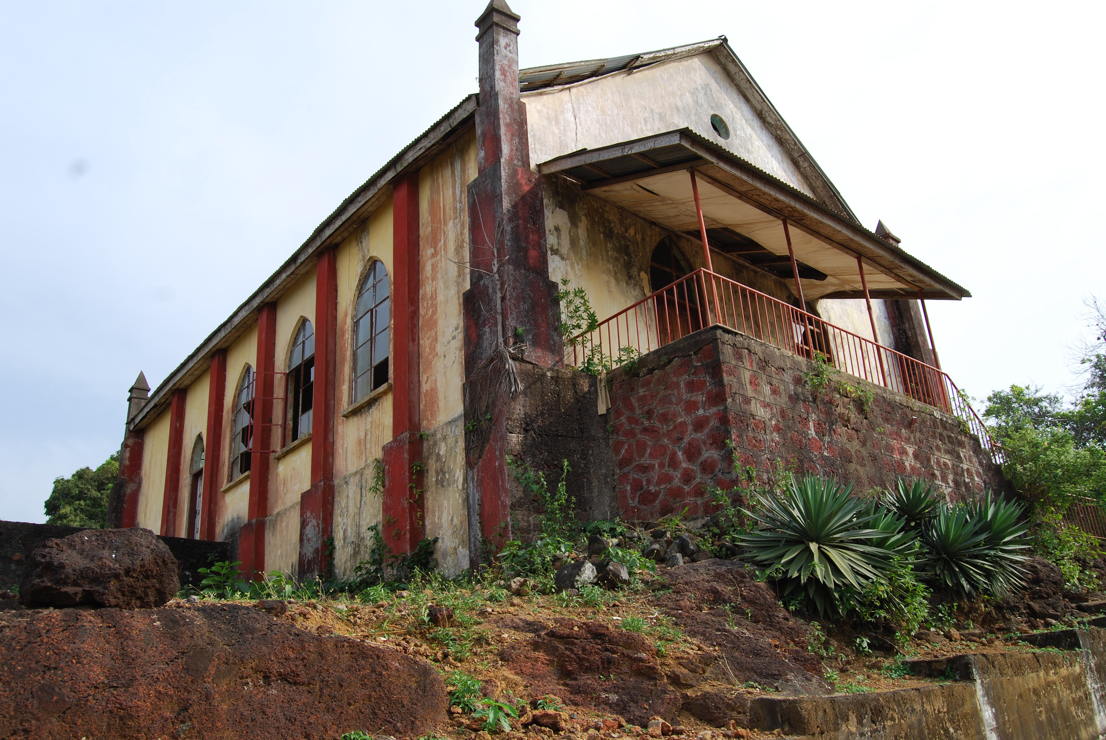 Mount Zion Baptist Church in Robertsport